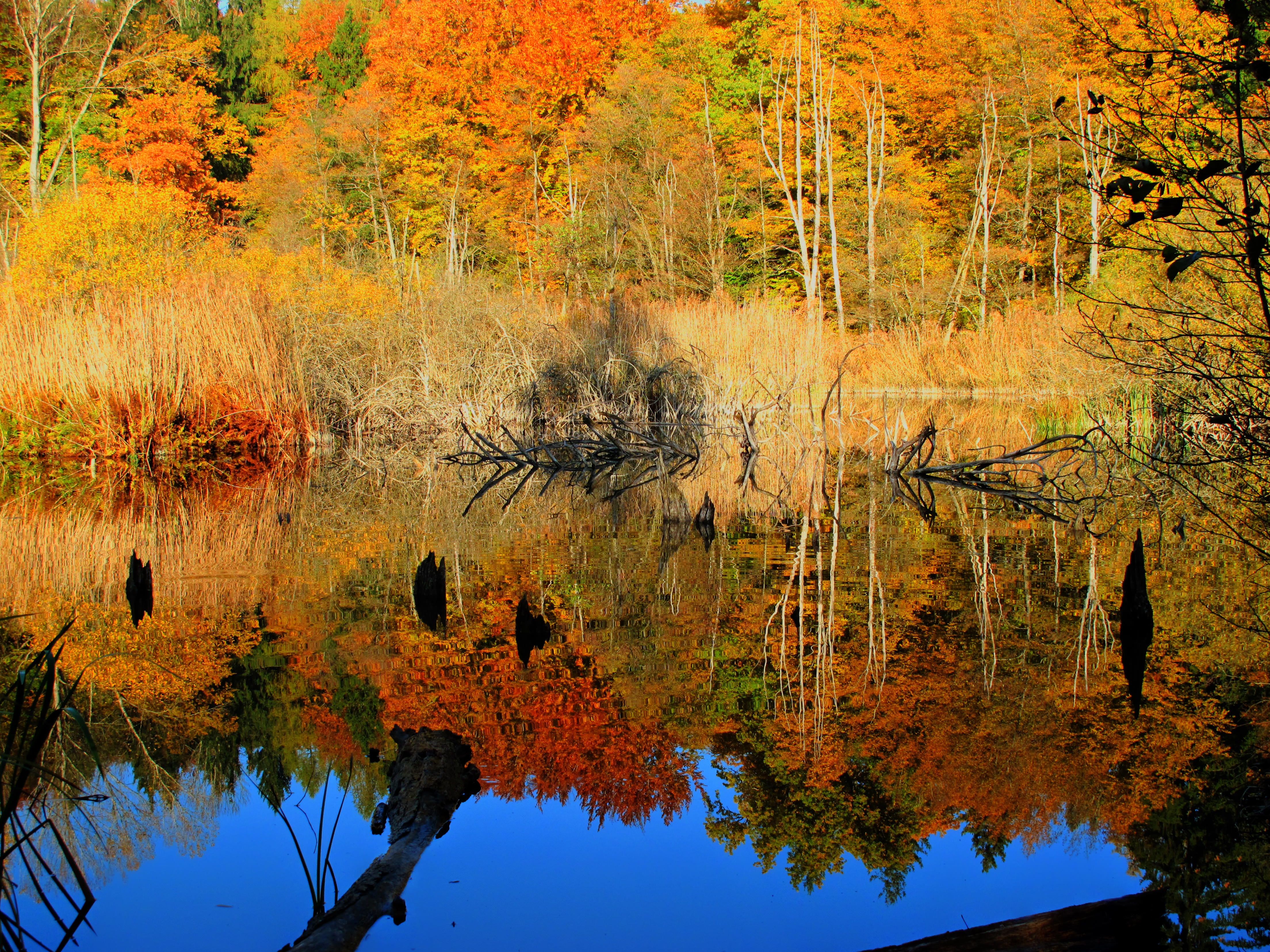 Hardtsee Gottmadingen